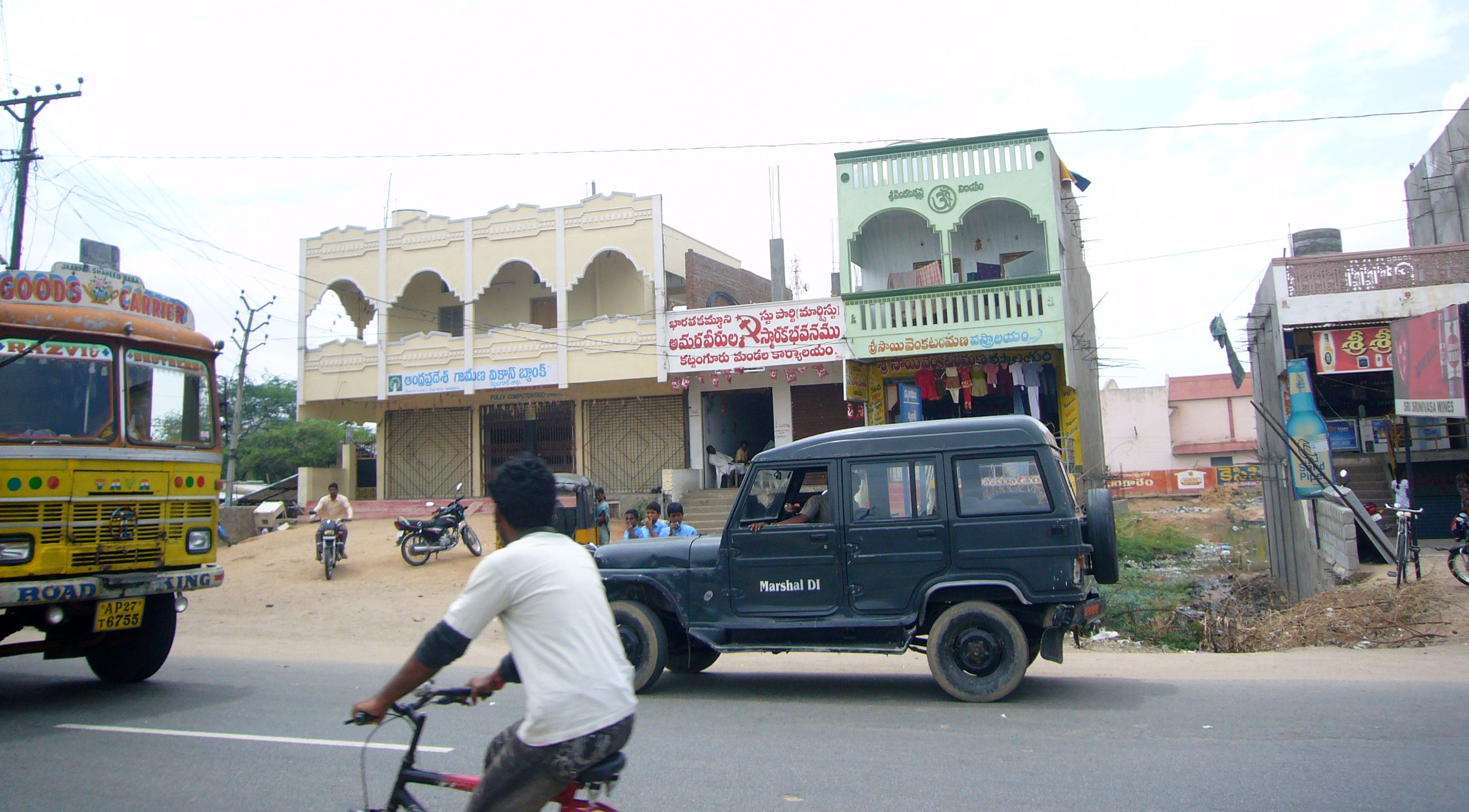 a few buildings on highway KATTANGUR village Nalgonda district, AP